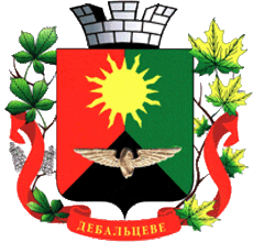 Герб Дебальцево